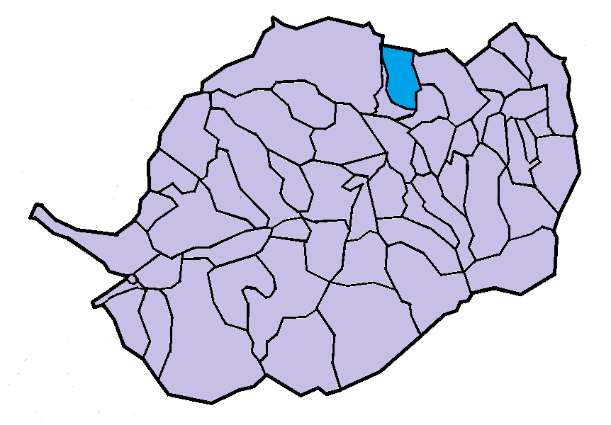 Molig en el Conflent, a partir del mapa municipal del Conflent de lliure disposició adaptat al Nomenclàtor toponímic aprovat el 20070